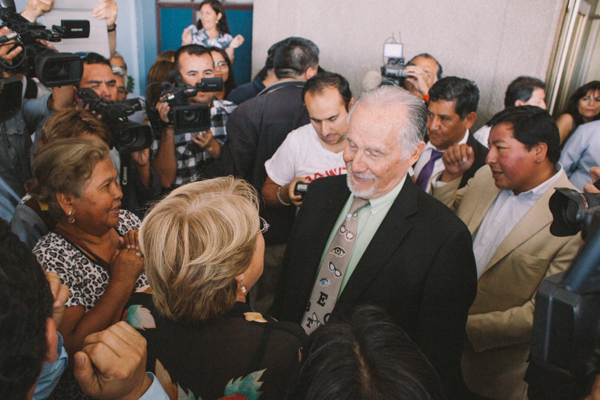 Arica 04/12/2013